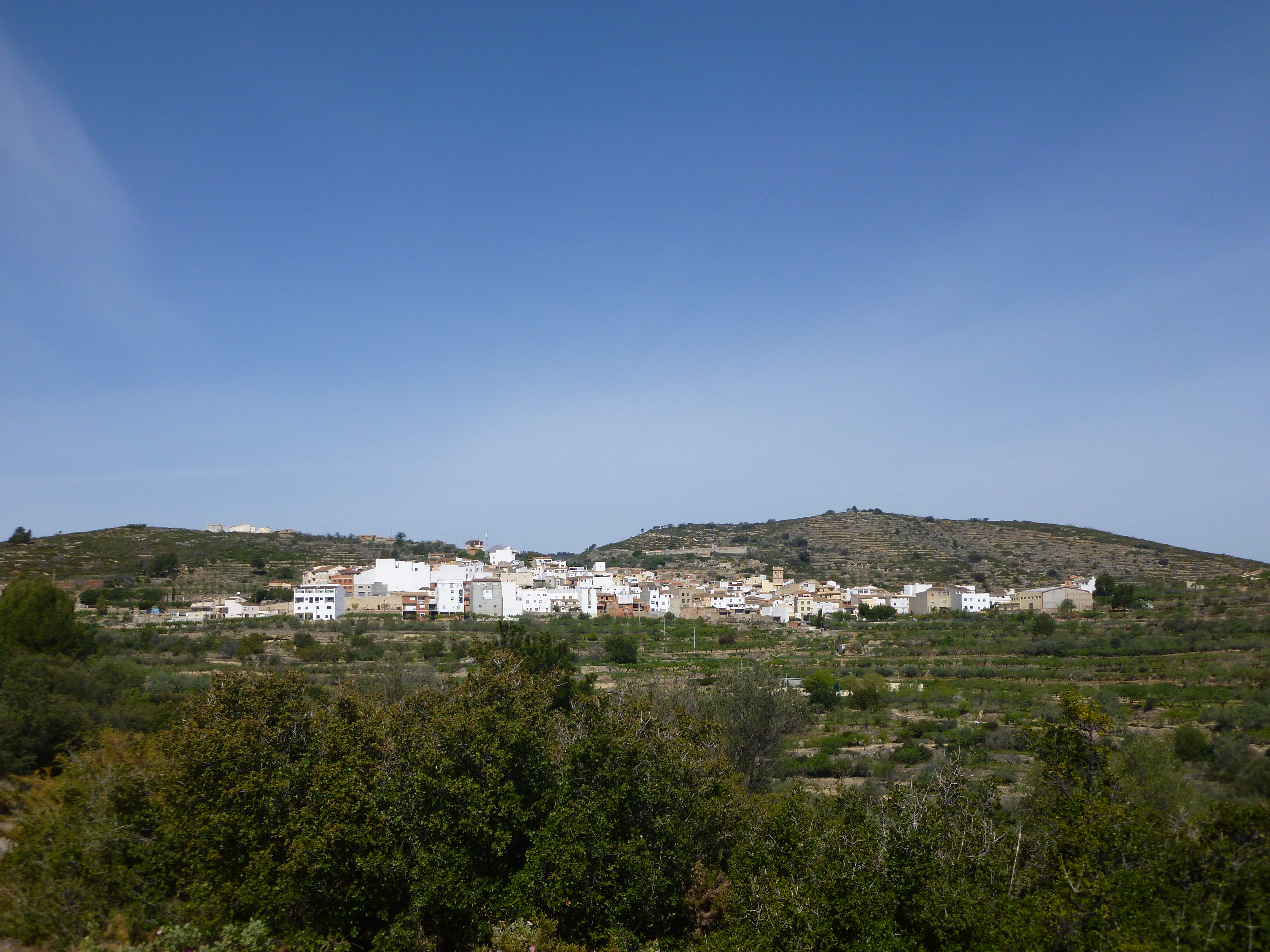 Vista de Costur